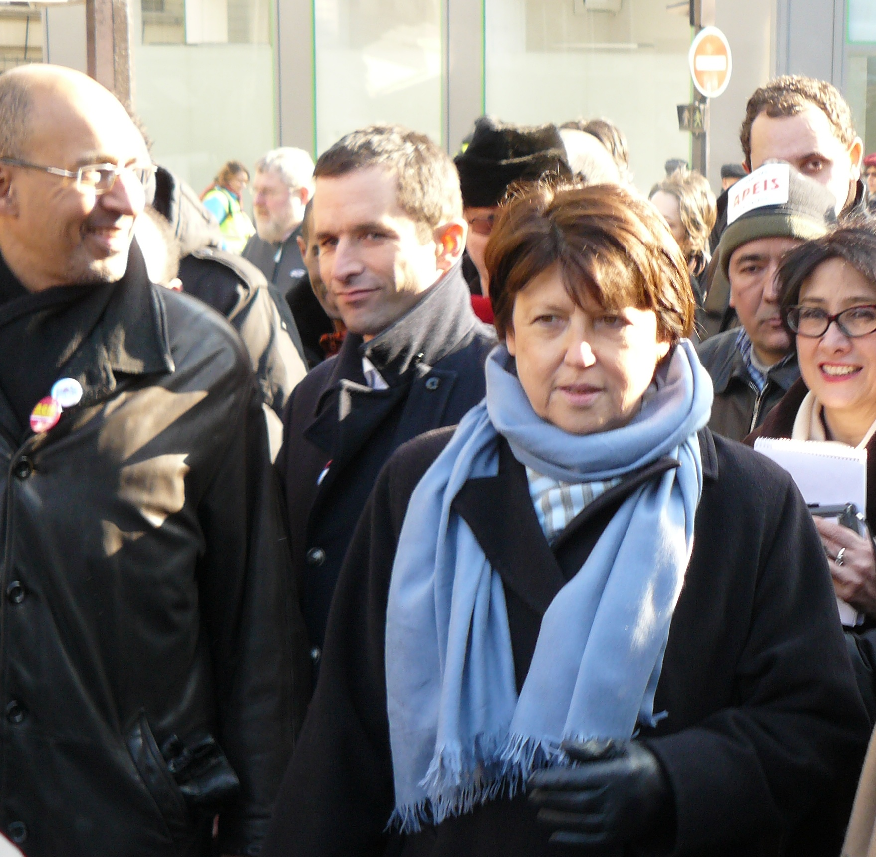 Martine Aubry, premier secrétaire du Parti socialiste français, en compagnie de Benoît Hamon et de Harlem Désir lors de la manifestation nationale du 29 janvier 2009, à Paris.